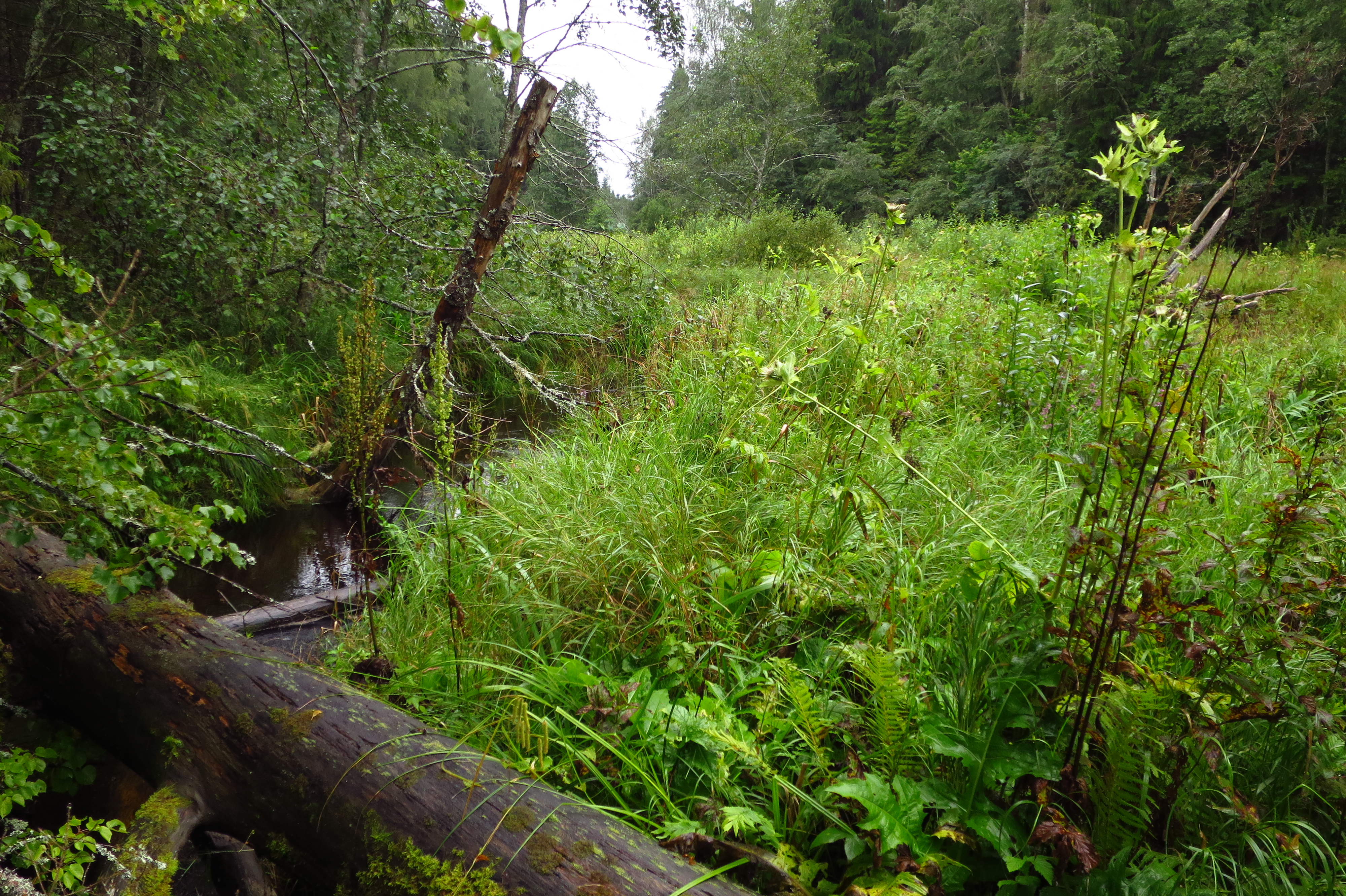 Pähni jõgi Pähni LKA-l